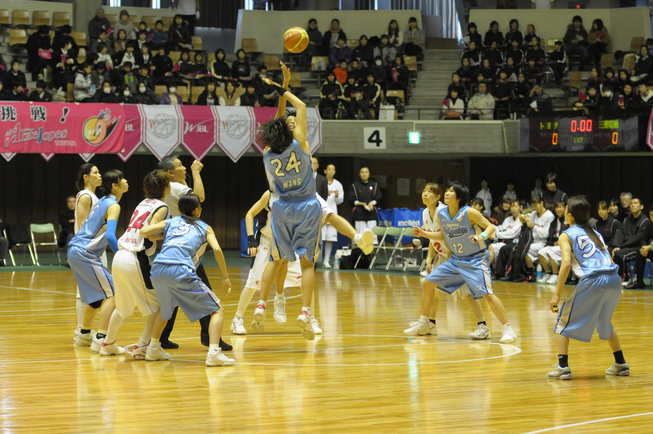 WJBL 12-13プレーオフ・ファーストラウンド、トヨタ対三菱電機。秋田県立体育館。